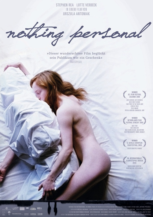 Filmplakat